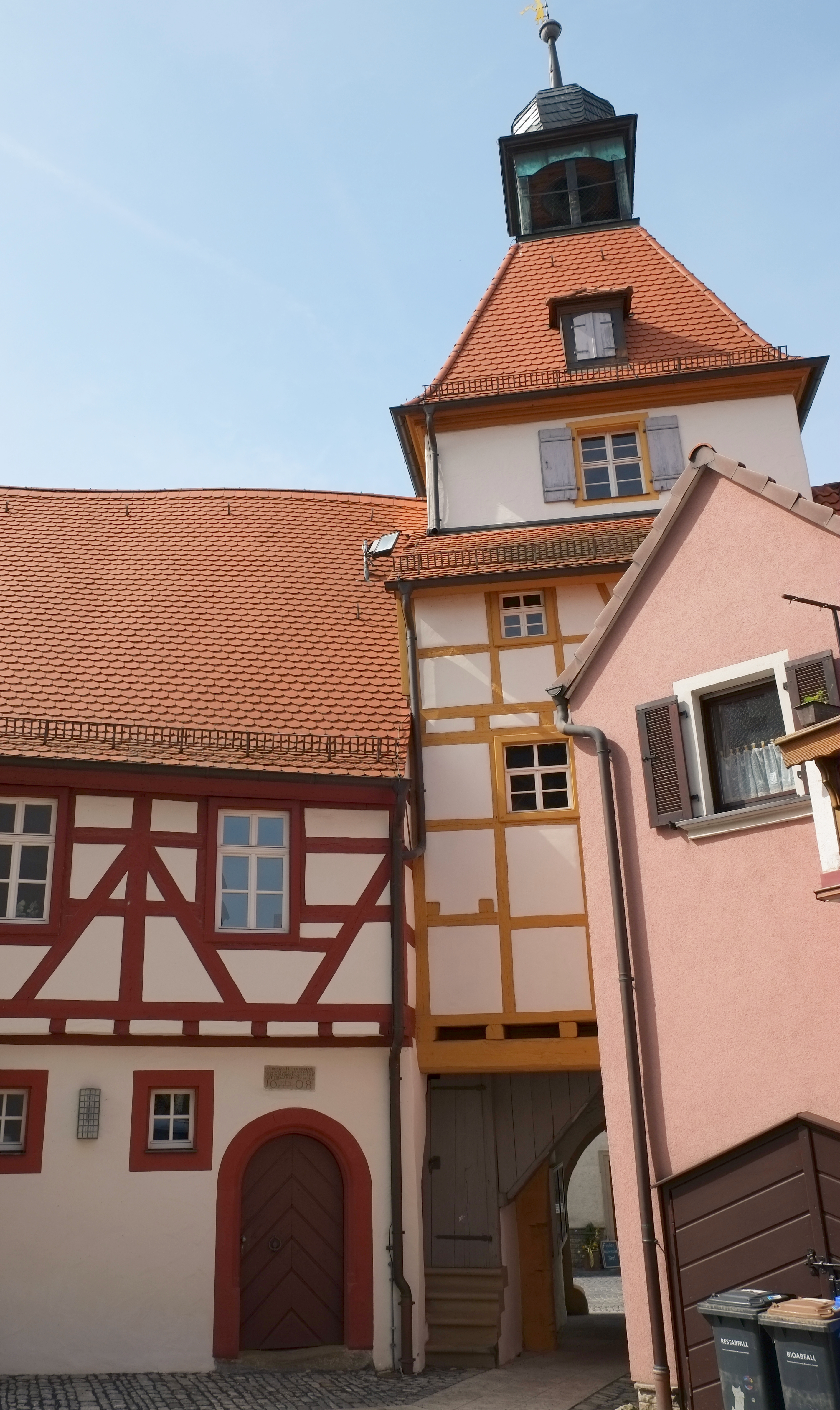 Rathaus in Marktsteft im Landkreis Kitzingen (Bayern, Deutschland)